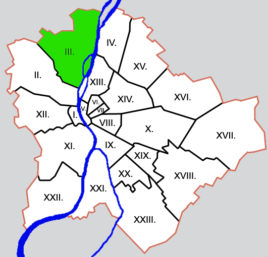 Budapest kerületei: III. kerület